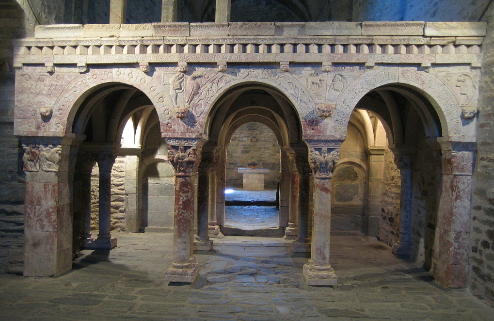 Tribuna de mármol blanco y rosáceo de la abadía de Serrabona (Francia)